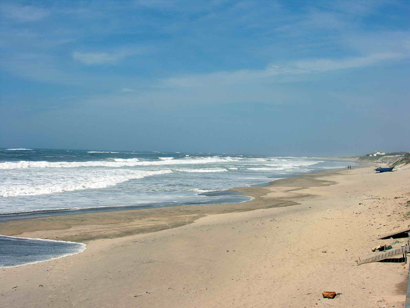 Fao